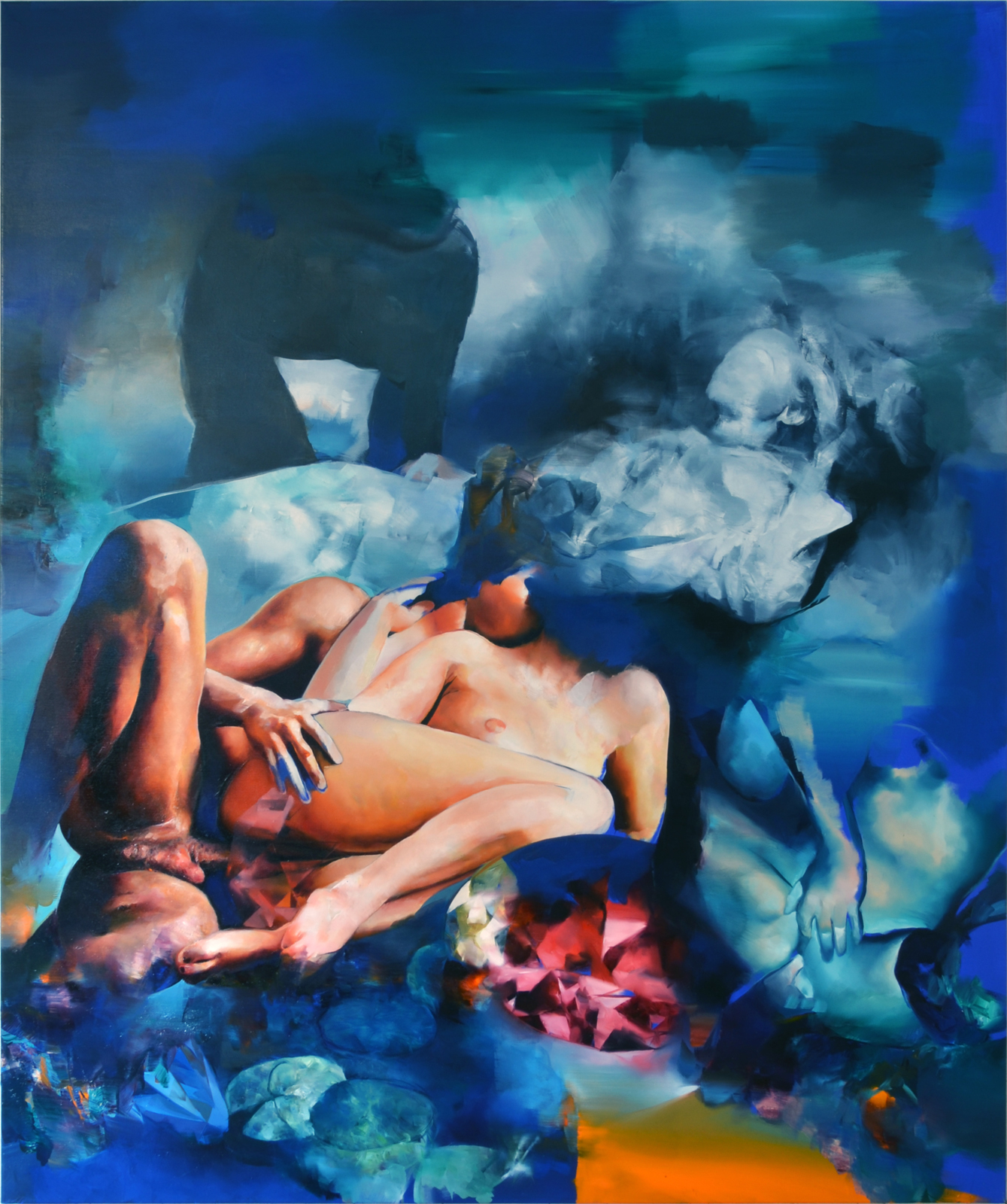 Pavel Vašíček, Sen o intimitě (2017), olej na plátně, 180 x 150 cm